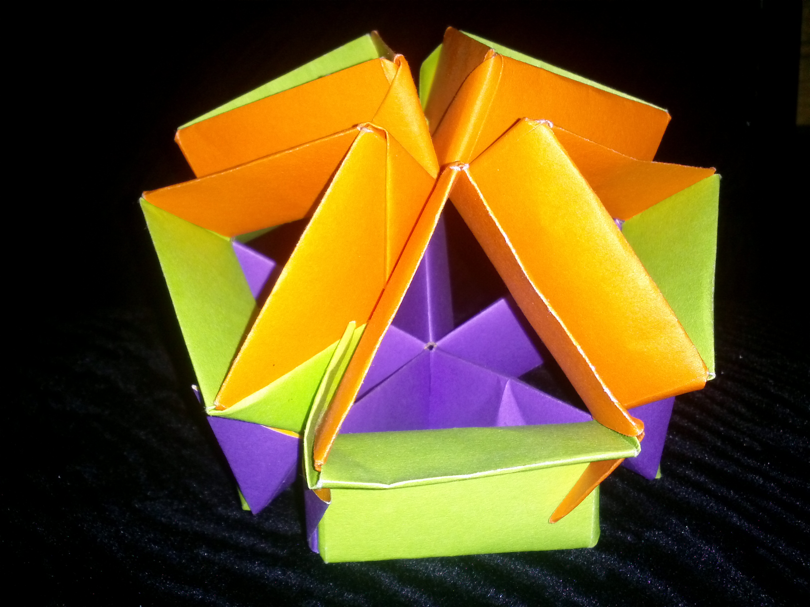 esfera en 3D